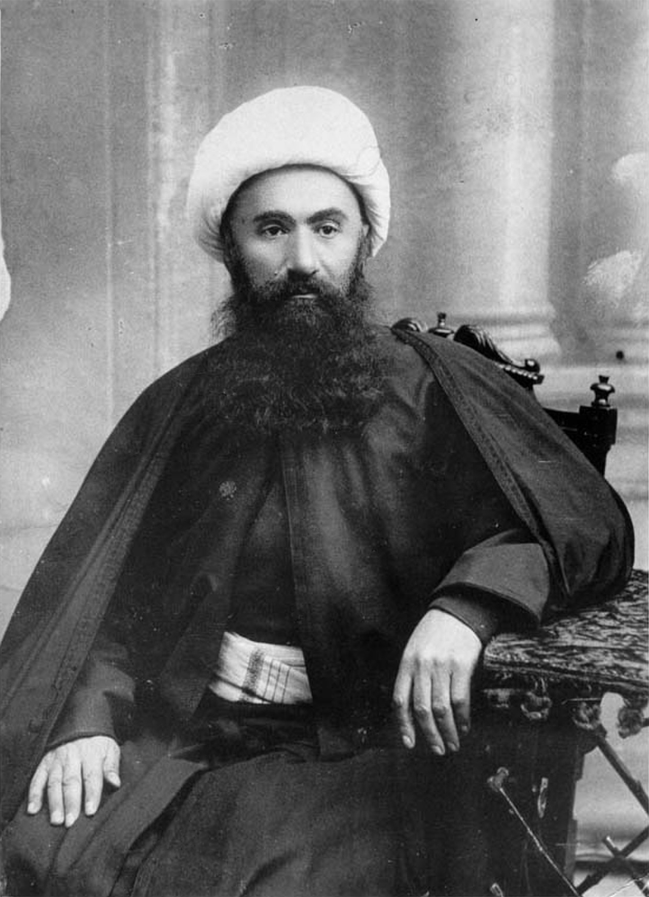 Məhəmməd Mövlazadə (1854-1932) — ilk dəfə Quranı azərbaycan dilinə tərcümə edən azərbaycanlı dini alim və Qafqaz bölgəsi üzrə ilk Şeyxülislam olmuşdur. O, həmçinin Quran üzrə izahlı lüğətin müəllifidir.